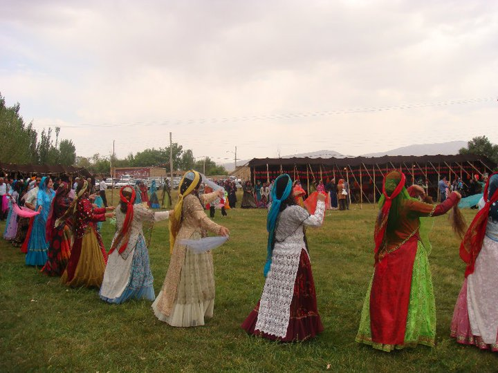 جشن های عروسی در عشایر: طاهری